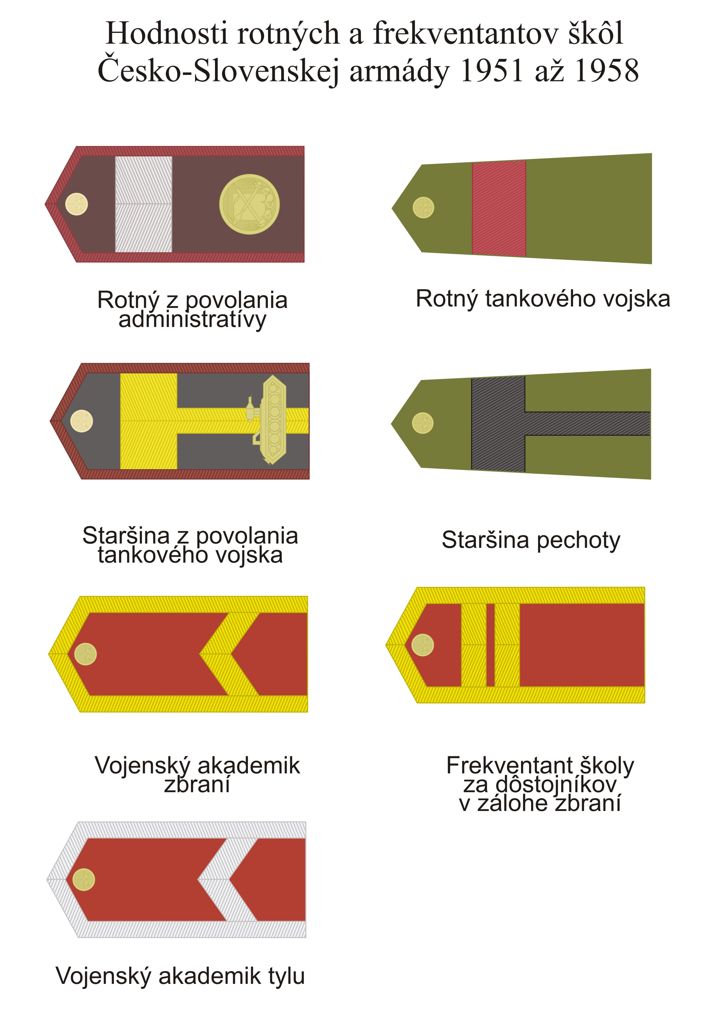 Vojenské hodnostné označenie práporčíkov Česko-Slovenskej armády používané od roku 1951 do roku 1958